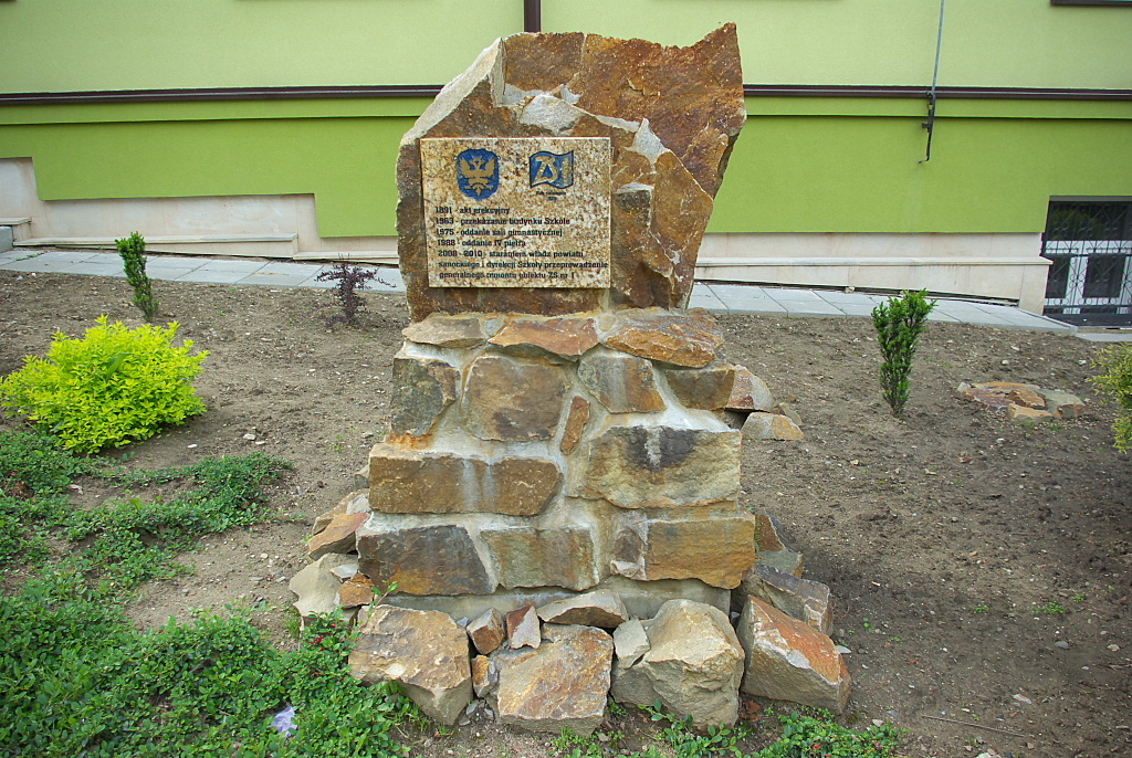 Pomnik Ekonomik Sanok